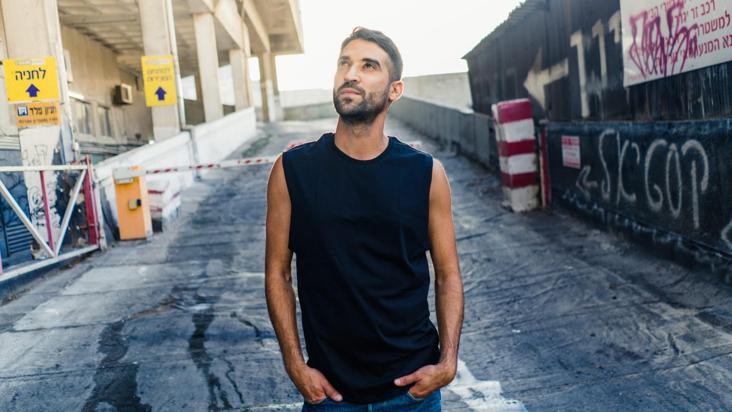 עידן חיים, זמר